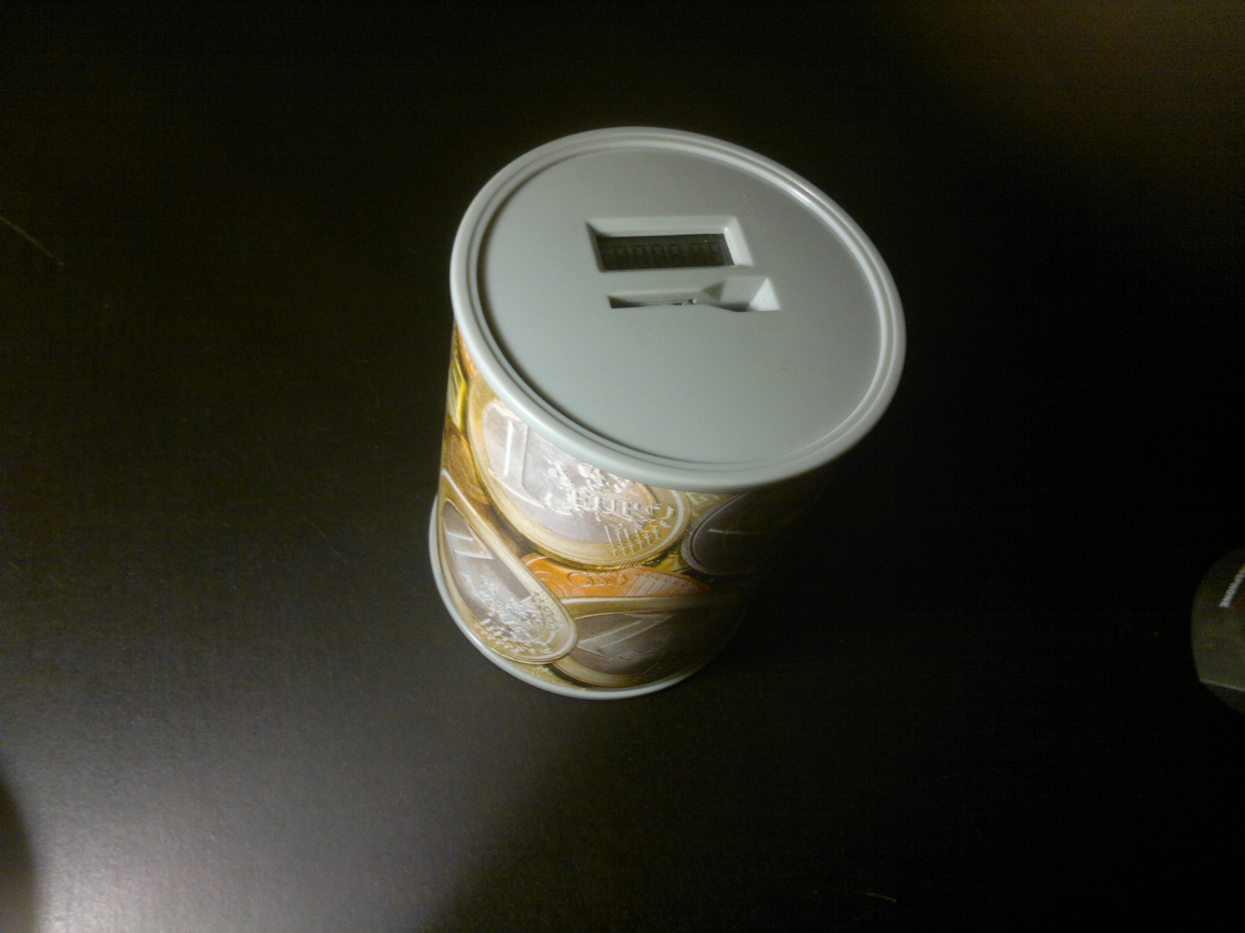 Moderne Spardose mit Digitaler Inhaltsanzeige(Gesamtbild)